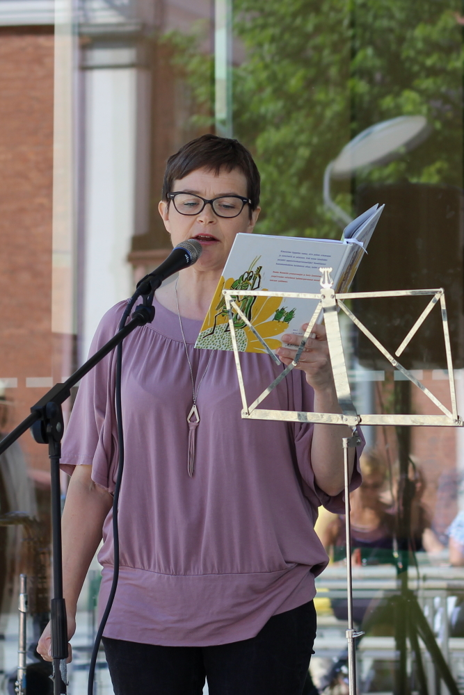 Kirjailija Reetta Niemelä Go Runo Go! -tapahtumassa Turussa 6.7.2019